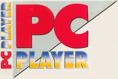 Von Heft 6/1993 bis 12/1998 verwendetes Logo der Zeitschrift PC Player.